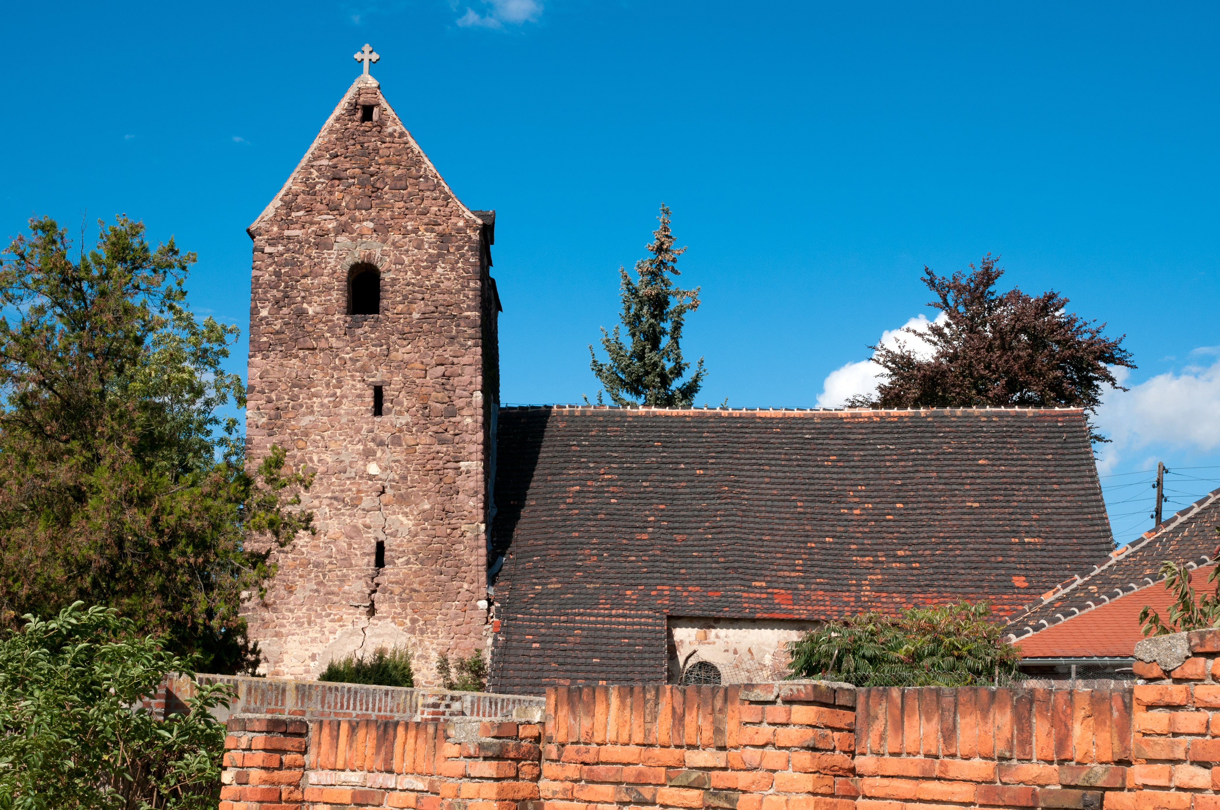 Lettewitz Kirche (Sachsen Anhalt, Deutschland)